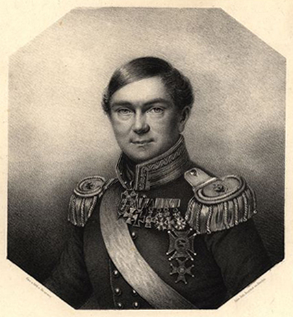 Karl Ferdinand von Graefe (1787–1840), deutscher Chirurg, Lithographie